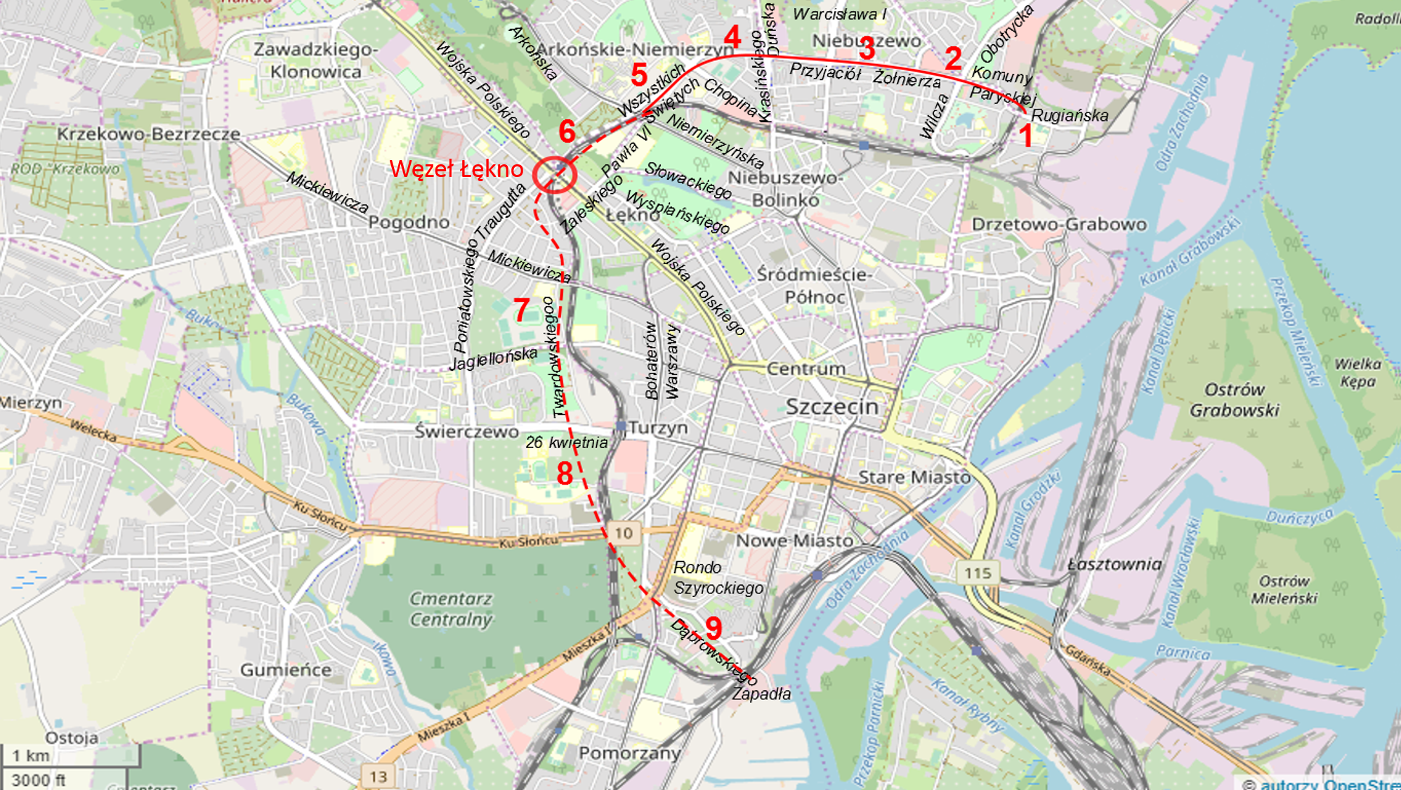 Obwodnica jest budowana etapowo, w ramech realizacji programu długofalowego. Linia ciągła - odcinki oddane do użytku przed 2019 (zrealizowane etapy I-V) Linia przerywana - orientacyjny szkic zamierzeń, sporządzony na podstawie ogólnego opisu w prasie i dokumentacji Urzędu Miasta; plany realizacyjne mają być opublikowane w przyszłości (bezpośrednio przed rozpoczęciem realizacji etapów VI-IX).